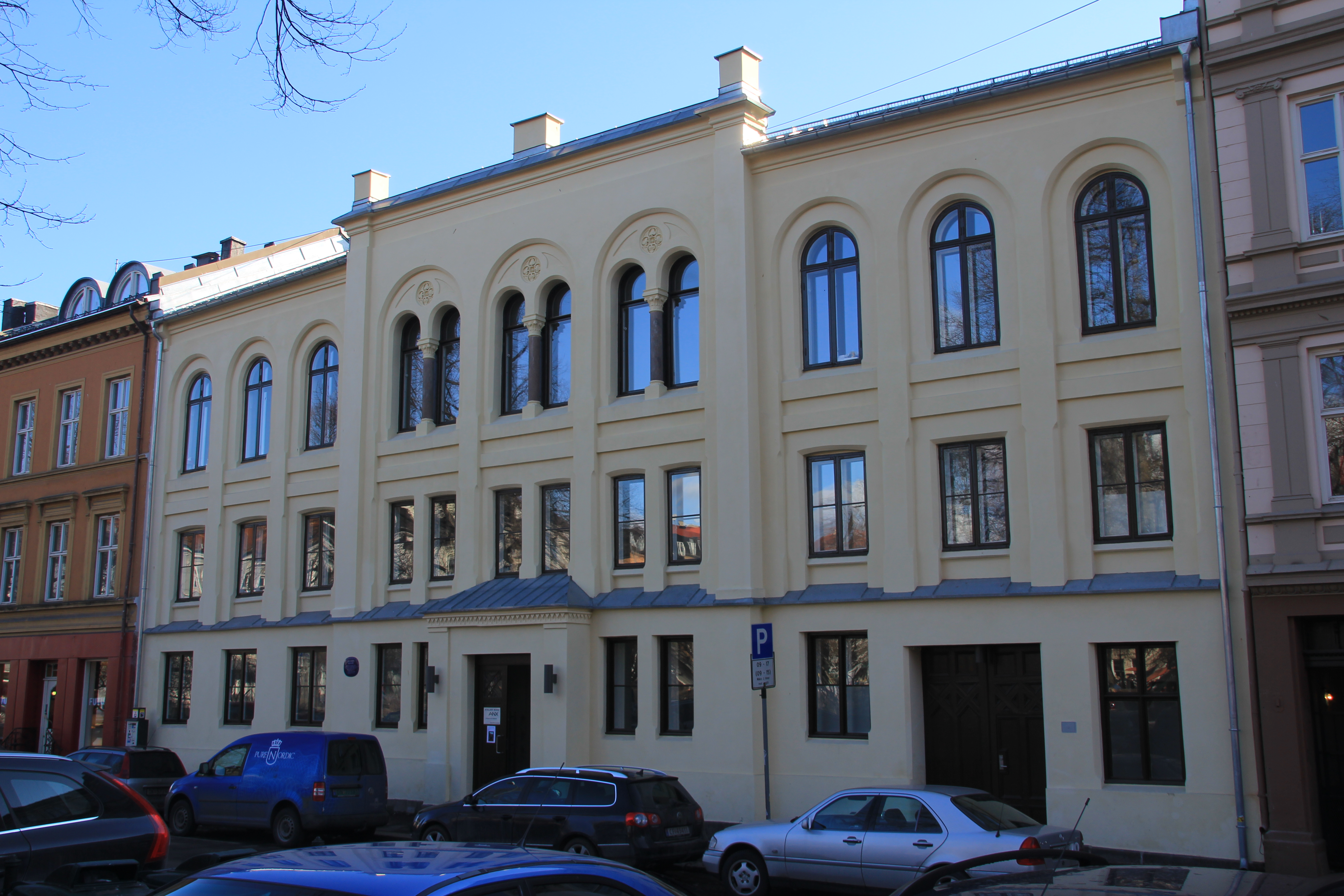 Hauges Minde er en bygård på Grünerløkka i Oslo. Den ligger i Sofienberggata og har adresse Olaf Ryes plass 2